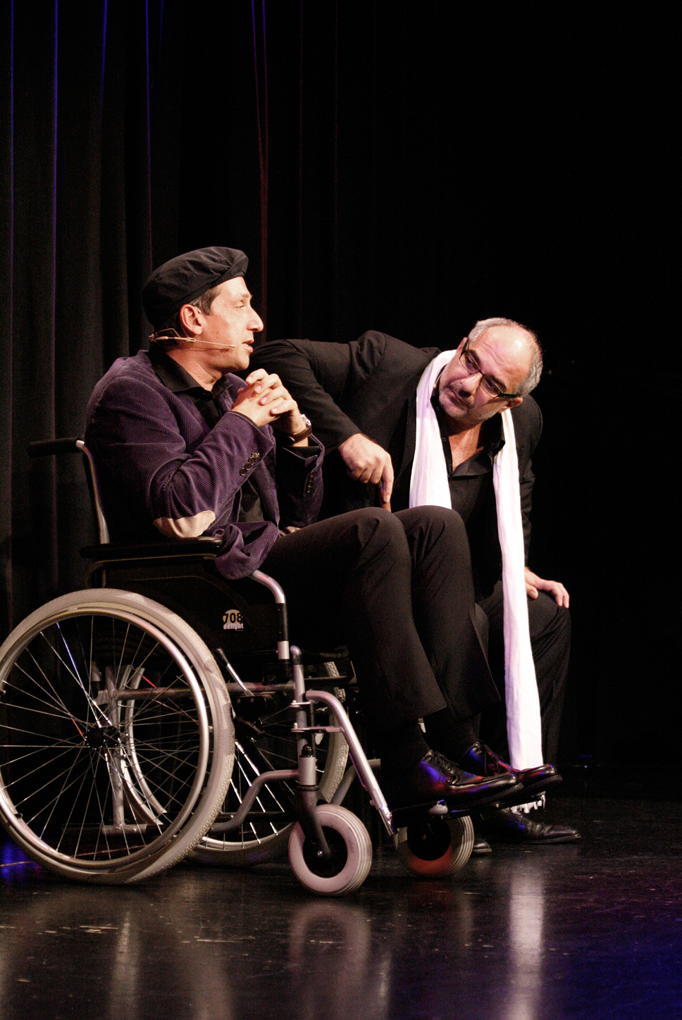 Michael Niavarani und Viktor Gernot bei der Verleihung des Österreichischen Kabarettpreises 2010 im Vindobona in Wien.